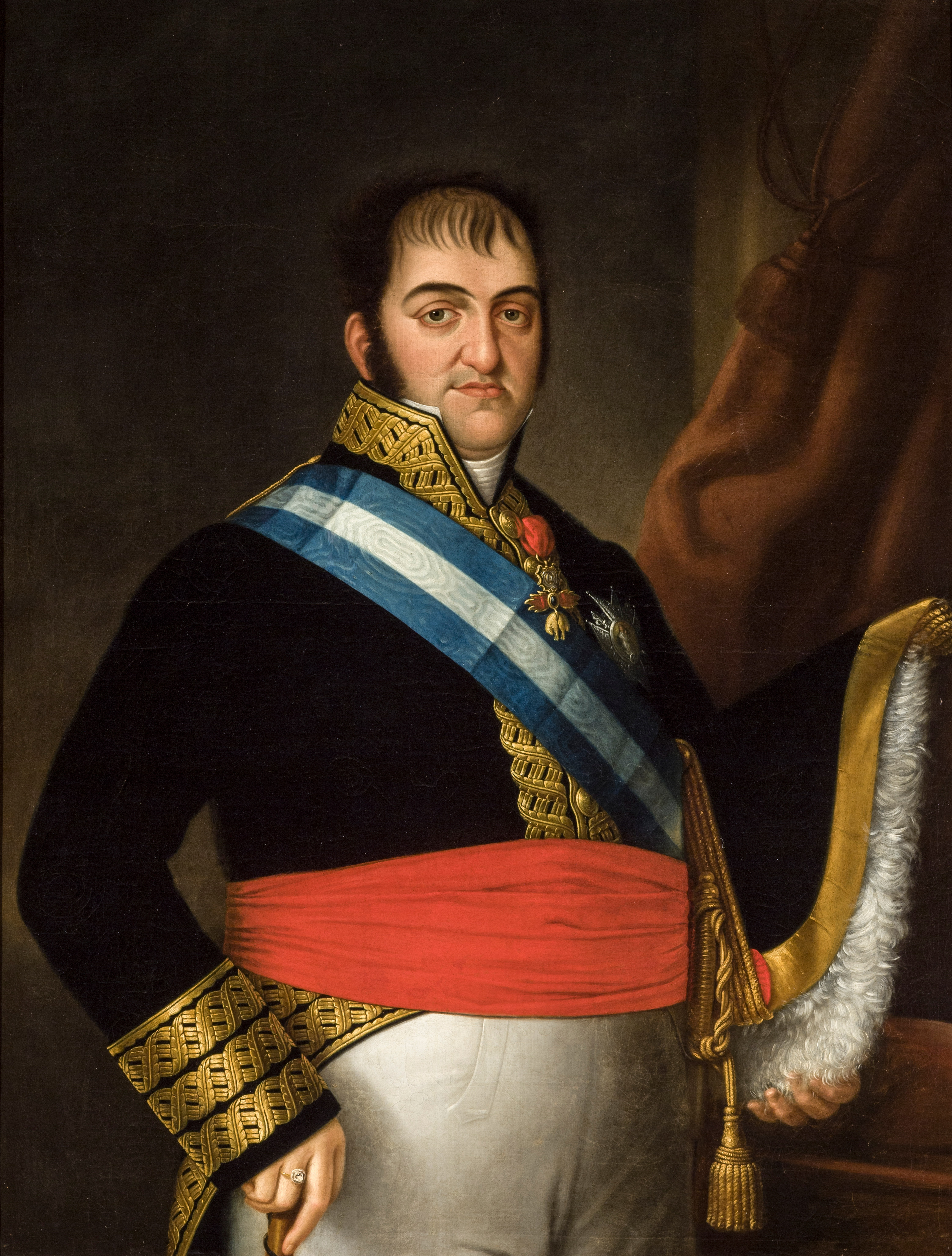 Retrato del rey Fernando VII de España (1857-1885). El pintor Luis de la Cruz era un gran miniaturista, y de ello queda constancia en la minuciosidad empleada en los detalles de la indumentaria que luce el monarca, quien aparece de medio cuerpo, con el uniforme de coronel de la Guardia de Corps y con un fajín rojo a la cintura, aunque también luce la banda de la Orden de Carlos III y varias condecoraciones, como el Toisón de Oro.